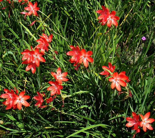 Hesperantha coccinea 'Major'